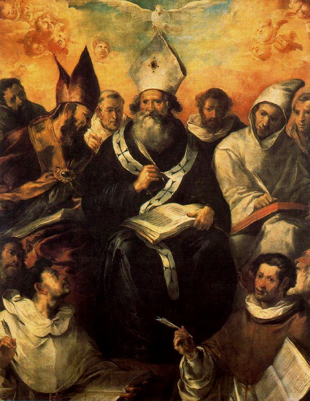 San Basilio dictando su doctrina